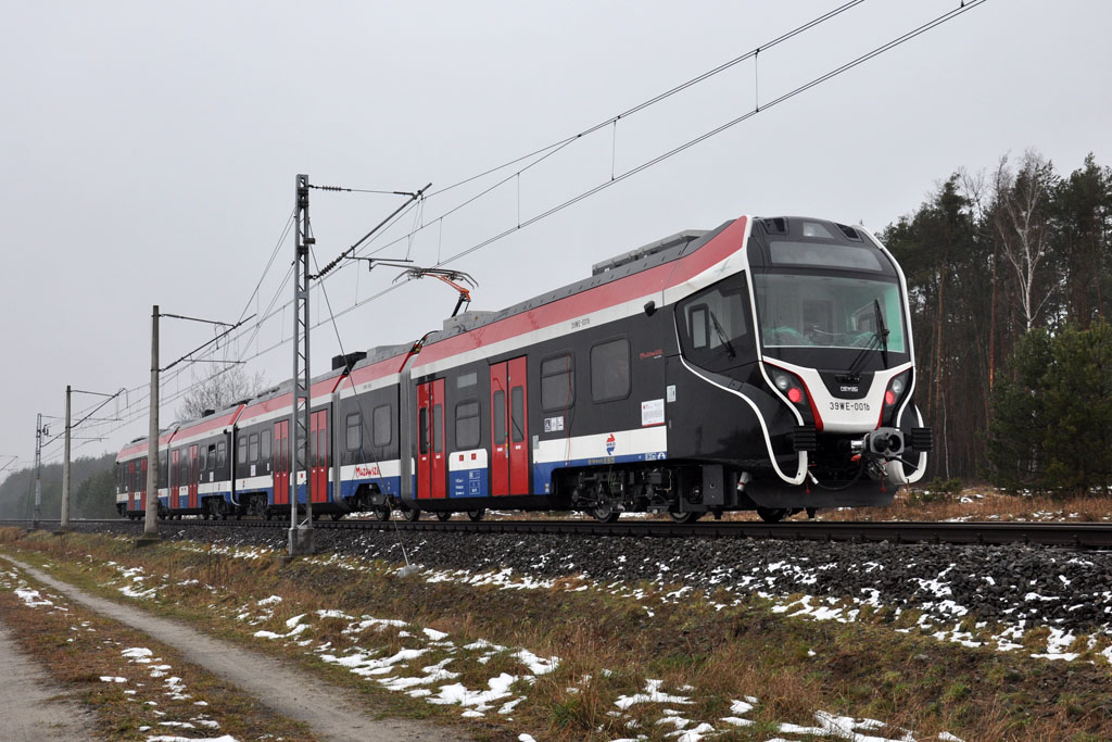 Elektryczny zespół trakcyjny 39WE-001 dla Warszawskiej Kolei Dojazdowej podczas testów homologacyjnych na torze doświadczalnym Instytutu Kolejnictwa w Węglewie koło Żmigrodu.